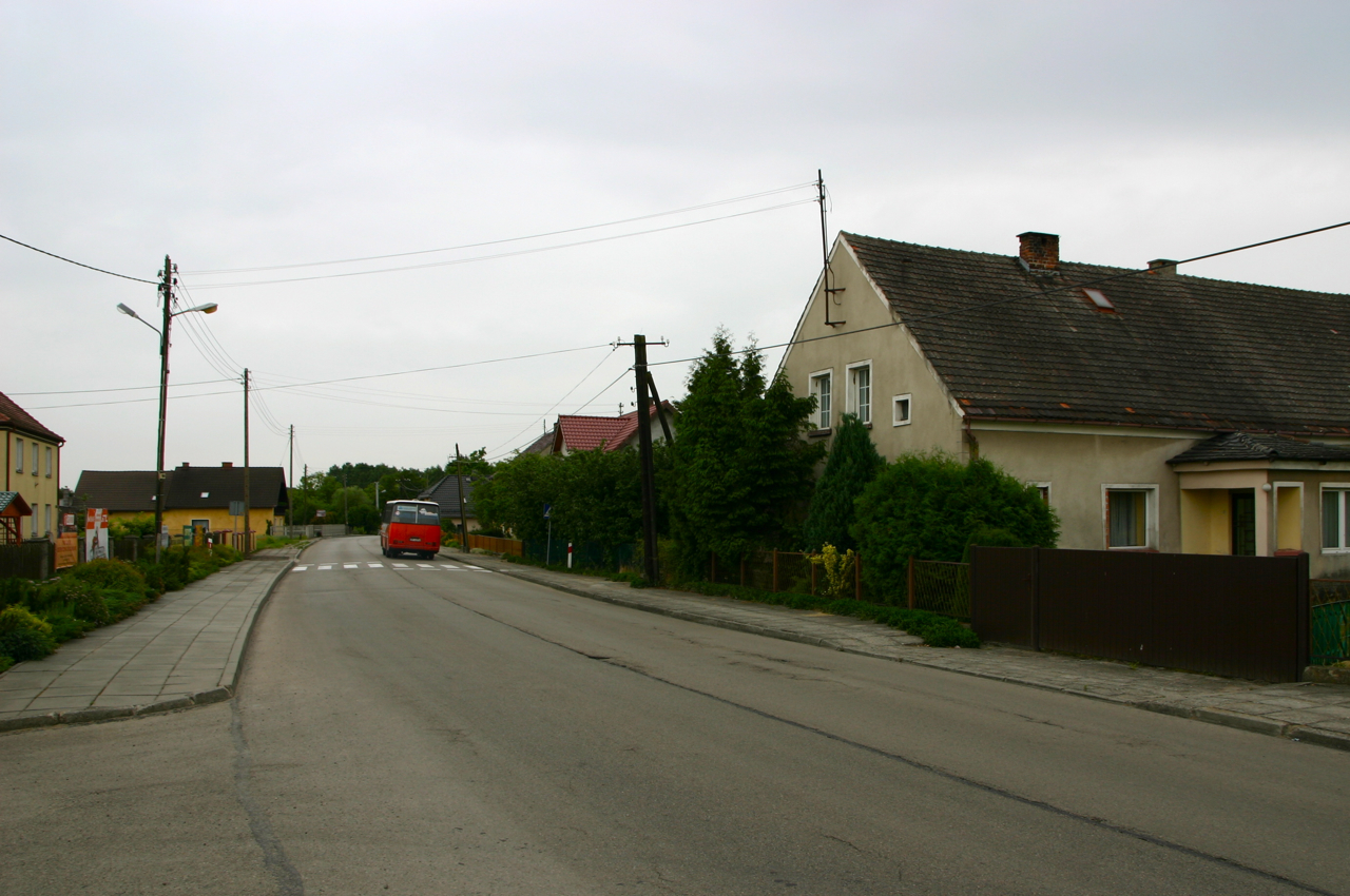 Gwoździce, niem. Forellengrund – wieś w Polsce.